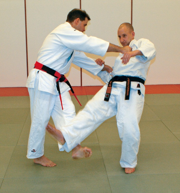 Ju-jutsu Ko soto gari